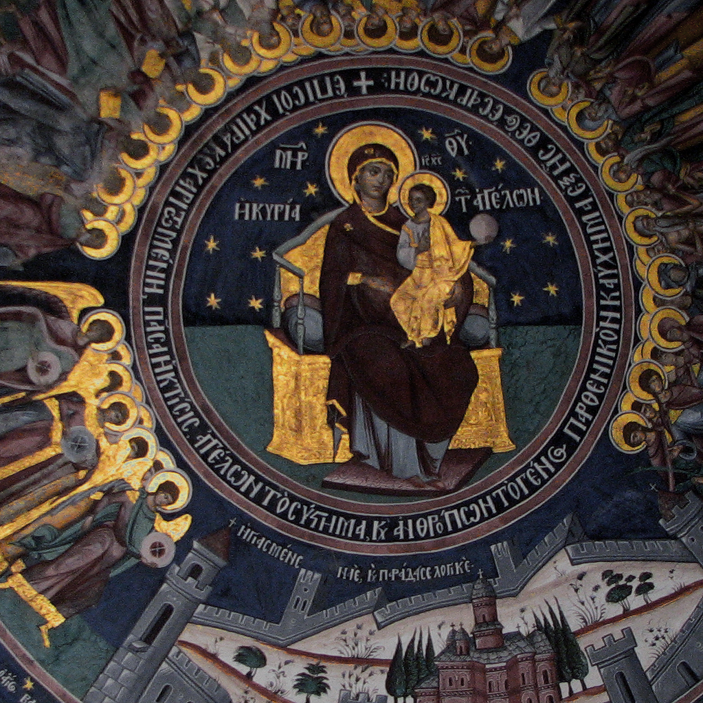 Mânăstirea Hurezi Hurezi Monastery Monastery of Horezu UNESCO World Heritage list